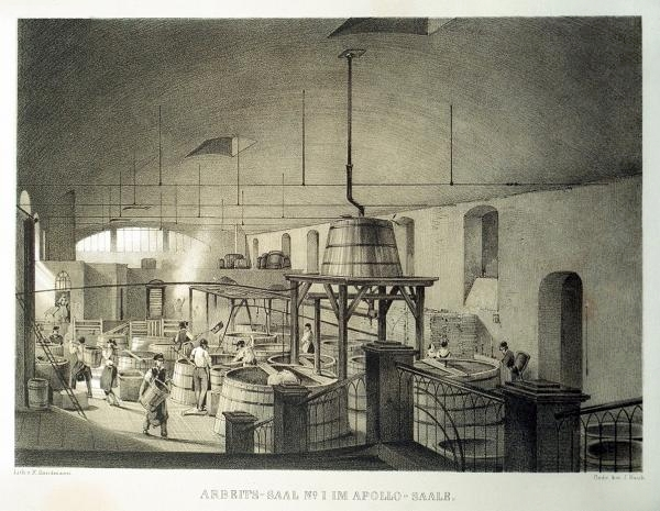 Lithographie des Arbeitssaales Nr. 1 der nach dem Apollo-Saal benannten Apollo-Kerzenfabrik in der Zieglergasse im 7. Bezirk in Wien.